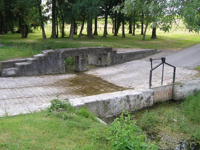 passerelle et gué à Angeac-Champagne en Charente